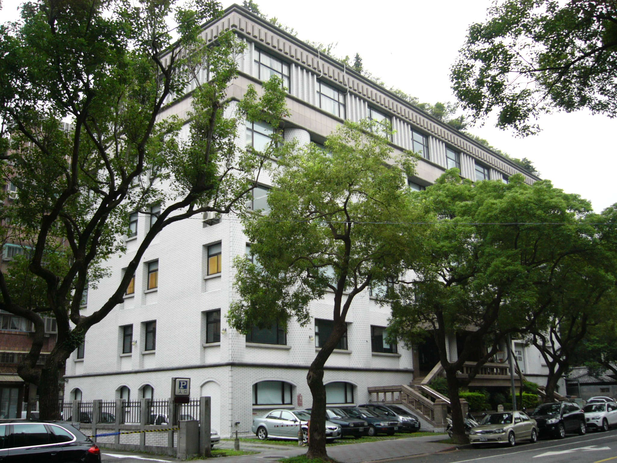 中華民國教育部第三辦公室，曾是臺灣省政府教育廳臺灣書店辦公地點，現由中華民國教育部與國立臺灣博物館共用。